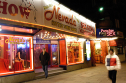 Die Reeperbahn ist eine weltbekannte Vergnügungsstraße im Hamburger Stadtteil St. Pauli.